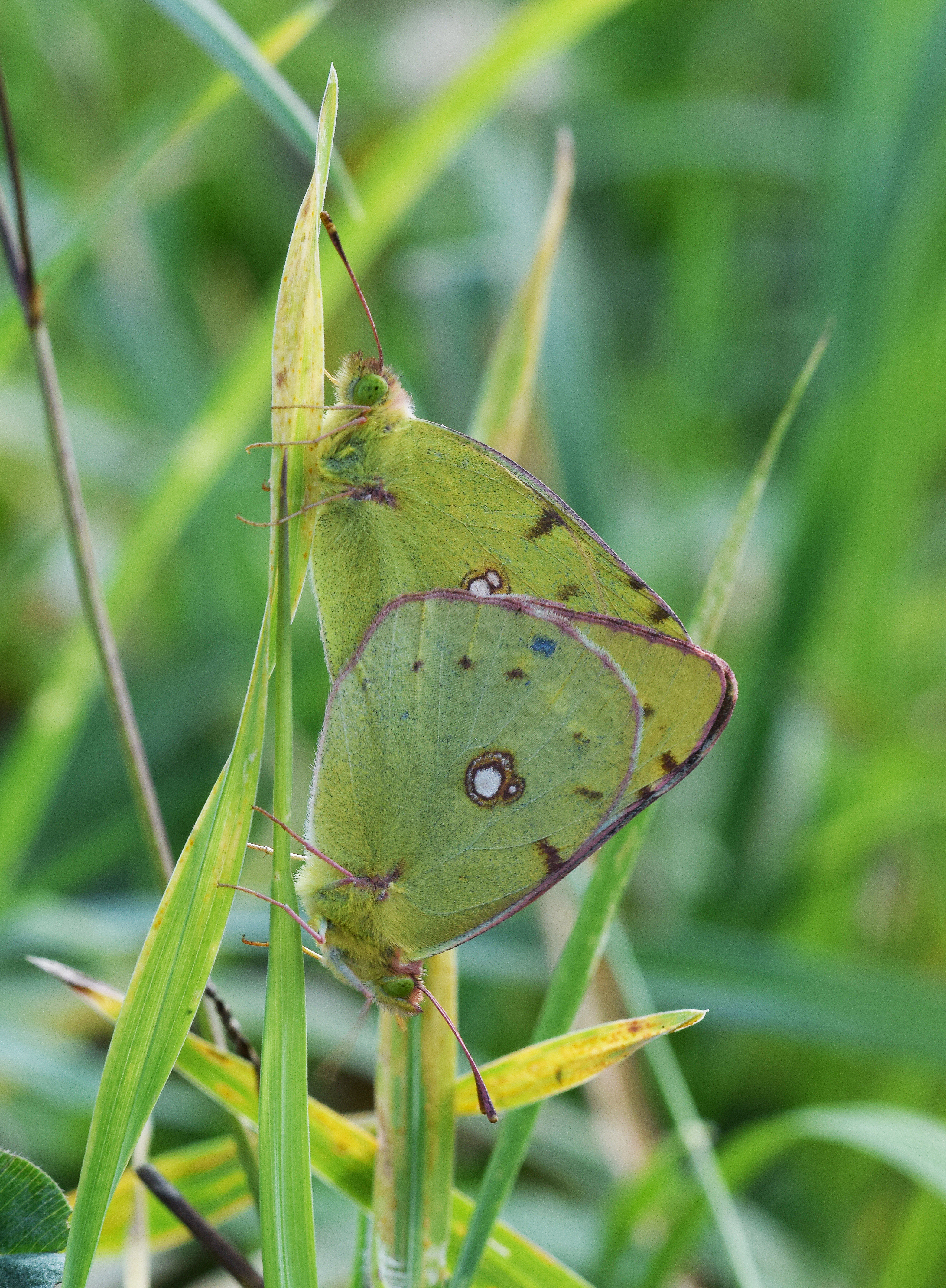 Oranje luzernevlinder (Colias crocea) paring